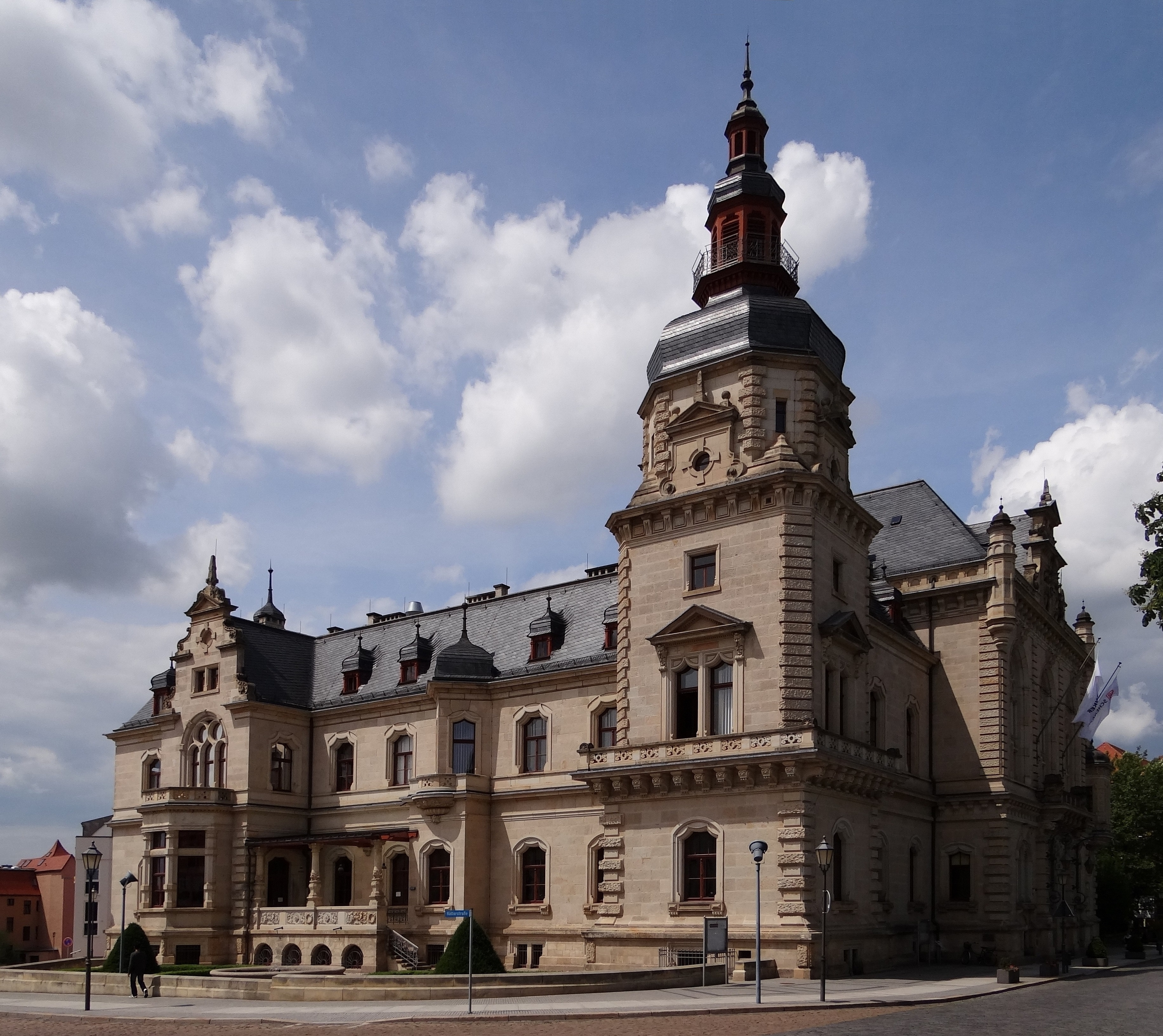 Merseburg, Ständehaus